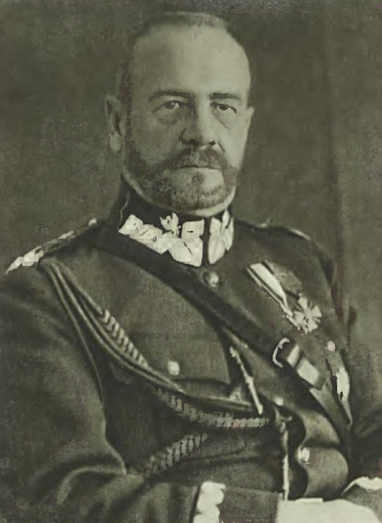 Generał Lucjan Żeligowski